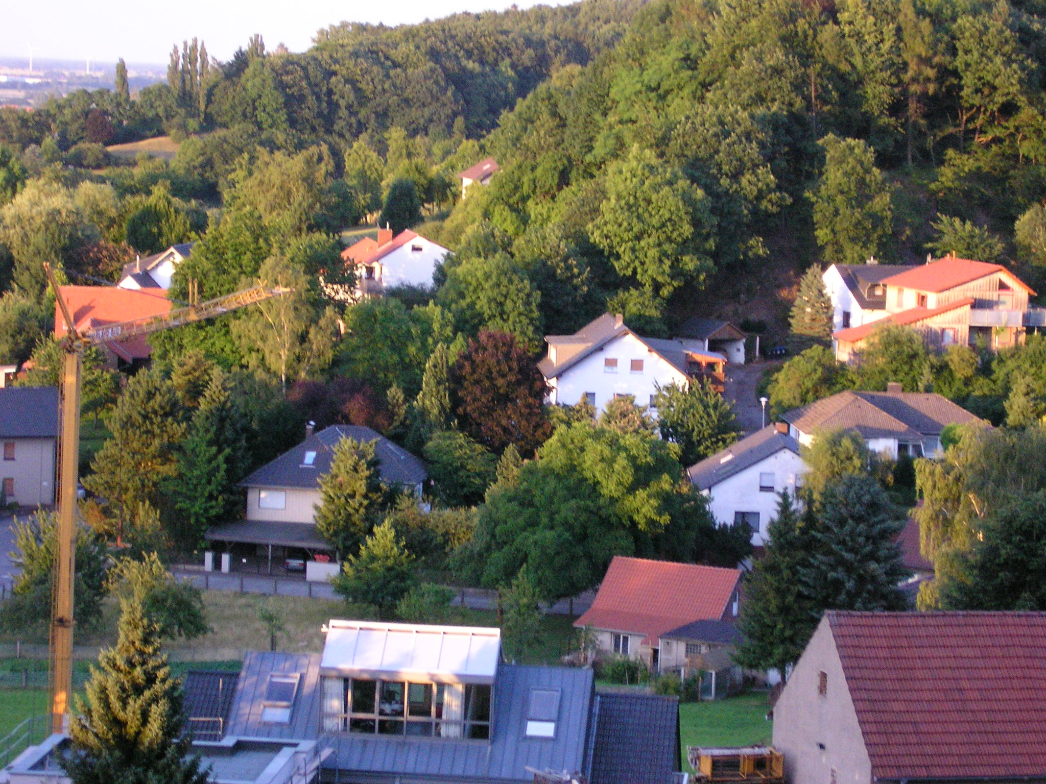 Gehlenbeck